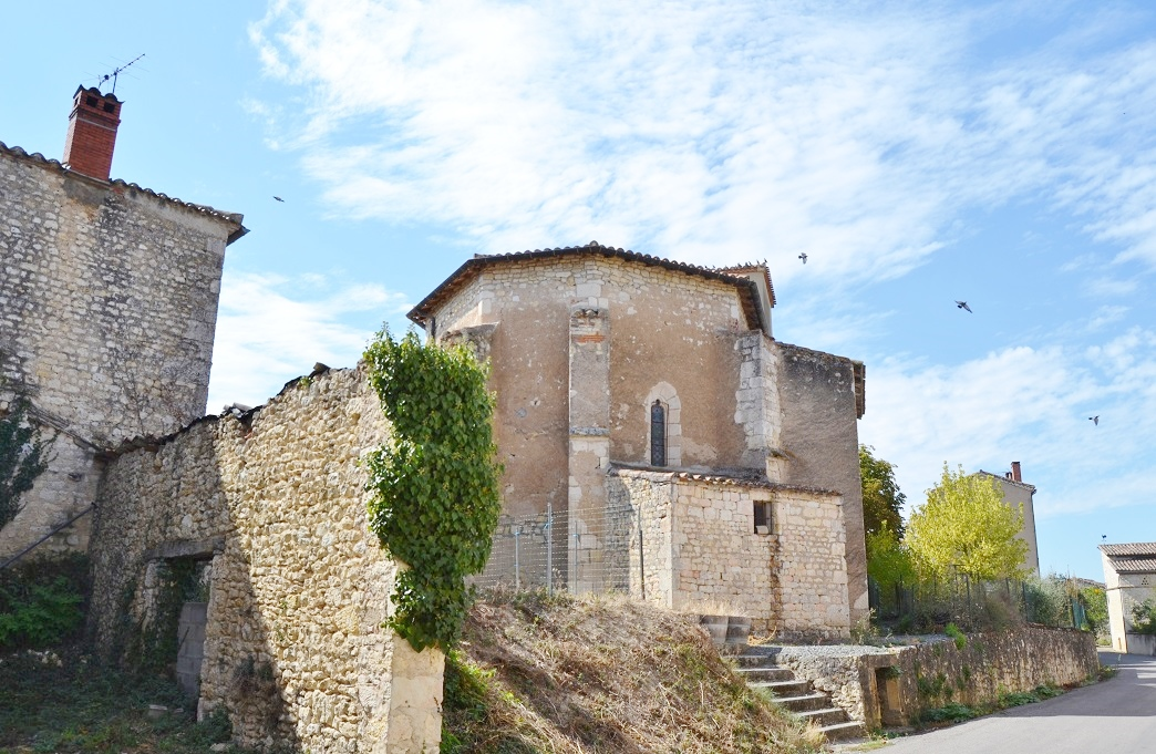 église Saint Jacques